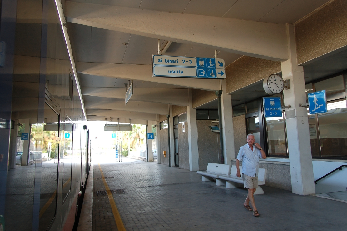 Stazione ferroviaria di Porto di Vasto